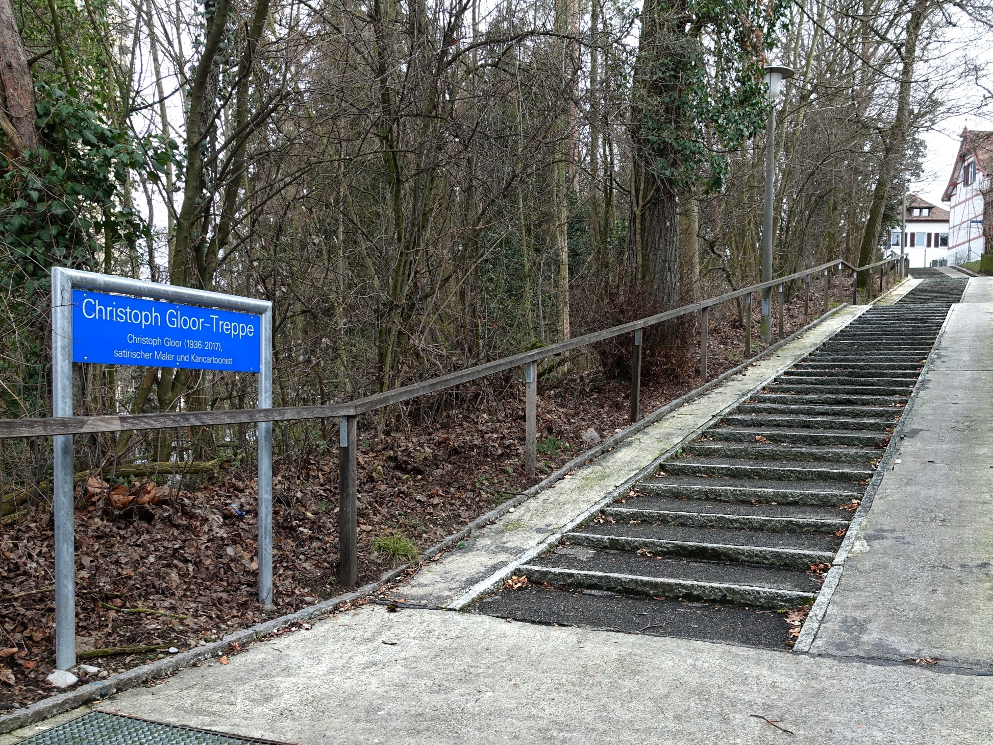 Christoph Gloor (1936–2017) Karikaturist, Maler, Zeichner und Bildhauer. Christoph Gloor-Treppe (früher Linden-Treppe) in Birsfelden. Standort: 47°33'06.4"N 7°37'34.6"E 47.551778, 7.626278